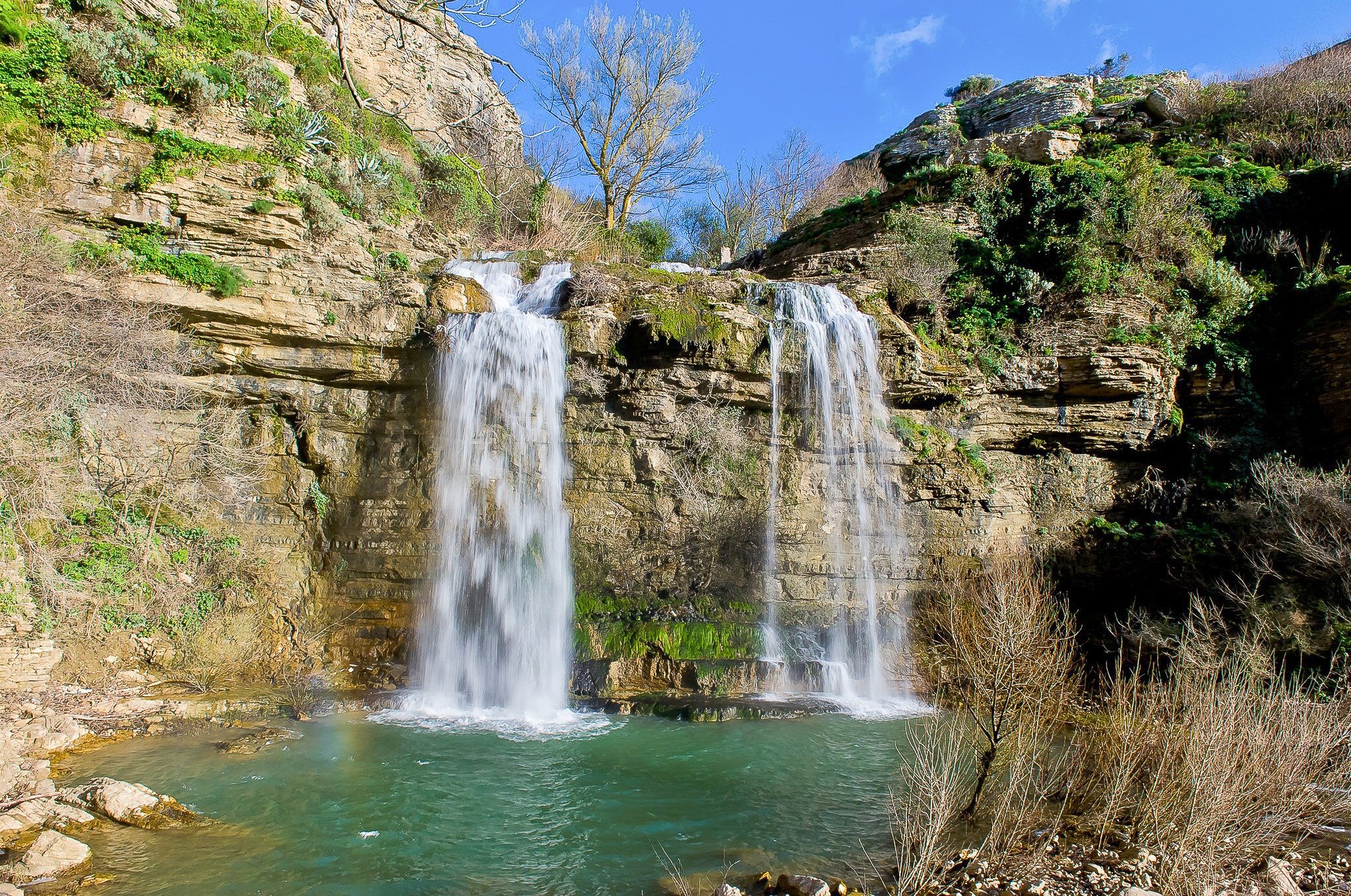 _______________________ "Cascata delle due Rocche" _______________________ Nel cuore del paese nella parte più antica di esso alla fine dell'antichissima Via Lombardia ai piedi del "Castello Soprano" utilizzato dagli arabi come punto di avvistamento, troviamo il fiore all'occhiello della nostra zona la "Cascata delle due Rocche" formate dal salto del Torrente San Leonardo o Torrente di Corleone che nei secoli ha scavato un suggestivo Canyon che prende il nome dal nostro paese. Fonte: goo.gl/Iz9O1y